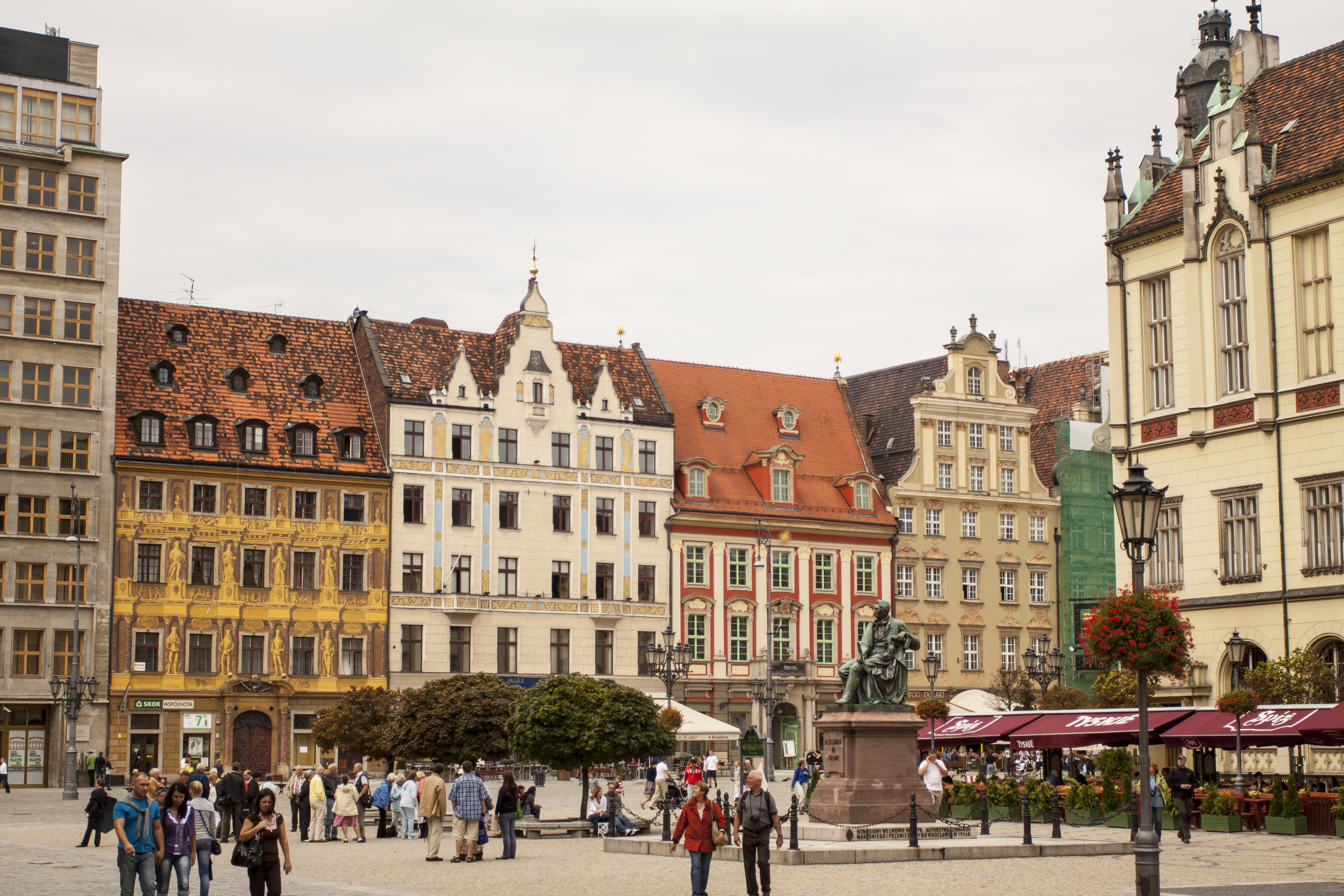 Häuserzeile an der Sieben-Kurfürsten-Seite (Westseite), Großer Ring, Breslau, Niederschlesien, Polen.